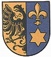 Familiewapen, geen copyrights